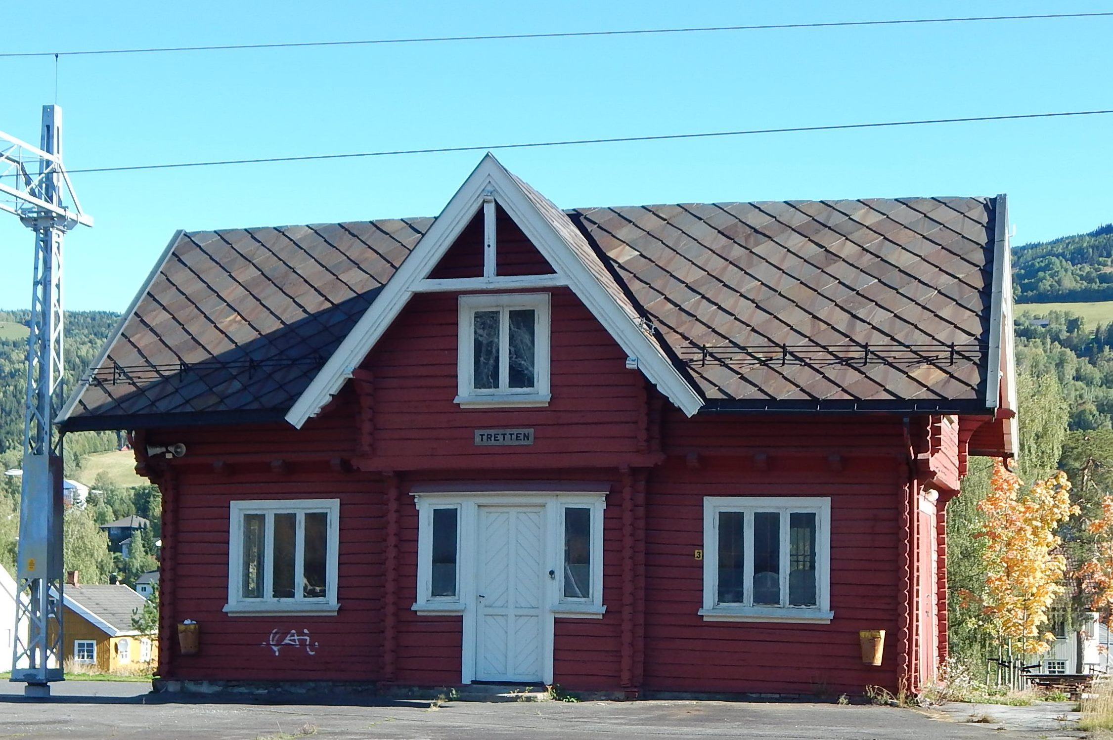 Ilgodshus ved Tretten stasjon